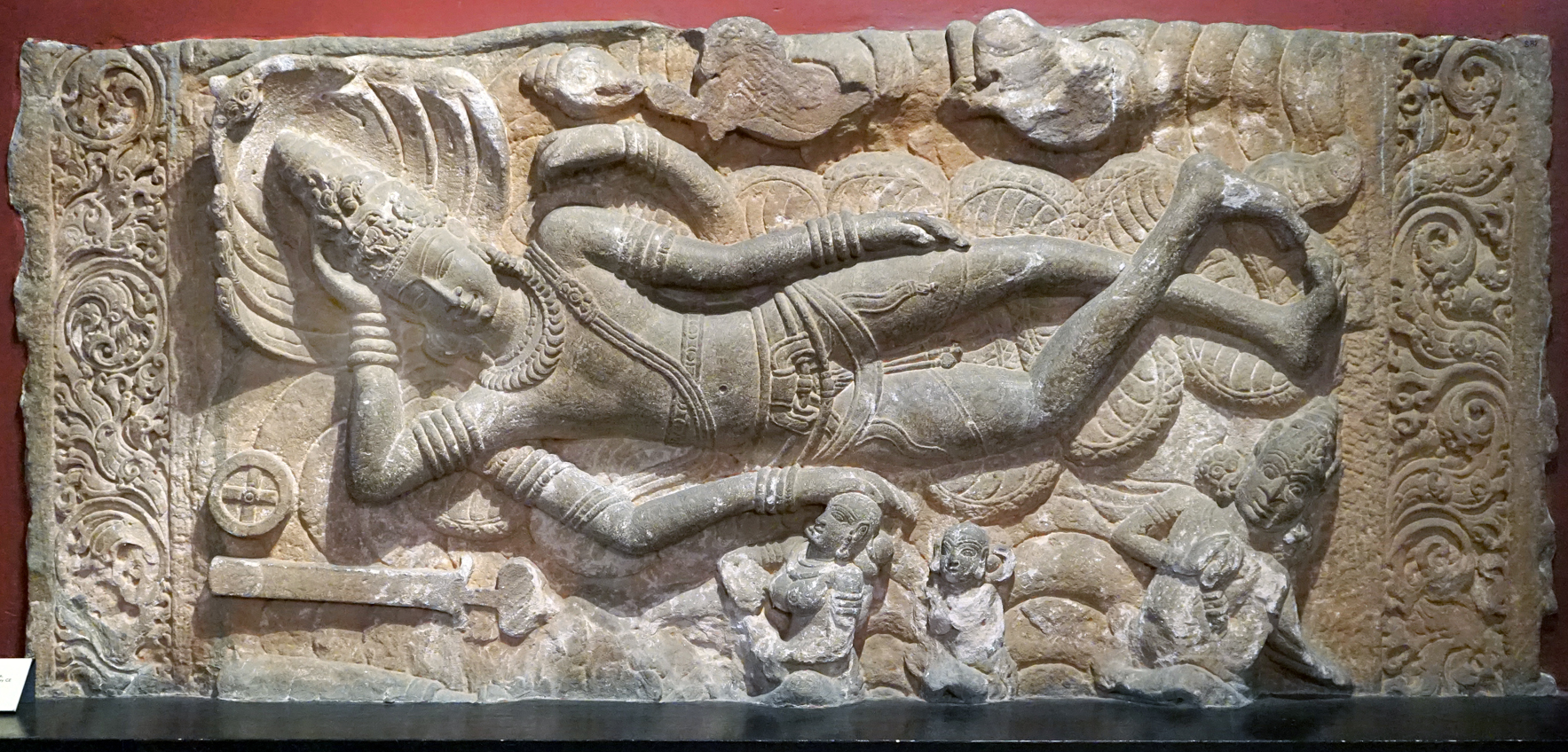 Sheshashayi Vishnu Huchchappaiyya Gudi Temple Aihole, Bagalkot, Karnataka VII ème siècle Grès rose Oeuvre présentée dans la galerie des sculptures du musée Chhatrapati Shivaji Maharaj Vastu Sangrahalaya, anciennement appelé Musée Prince de Galles (futur Georges V), Musée de l'Inde occidentale, est l'un des musées d'art et d'histoire de premier plan en Inde. Le bâtiment du musée, construit en 1905 (architecte George Wittet), est un bel exemple du style indo-sarracénique, mêlant des influences occidentales et indo-musulmanes. Ainsi, le dôme est d'inspiration moghole. Le musée possède une collection de plus de 60 000 objets d'art. A la différence de beaucoup de musées indiens, sa muséographie est moderne et bien conçue. Un audioguide en français est disponible à l'entrée et des bornes numériques permettent aux visiteurs d'obtenir des informations complémentaires dans les salles d'exposition. Chhatrapati Shivaji Maharaj Vastu Sangrahalaya (CSMVS) ancien Musée Prince de Galles, musée de l'Inde occidentale de Mumbai (Bombay) csmvs.in/